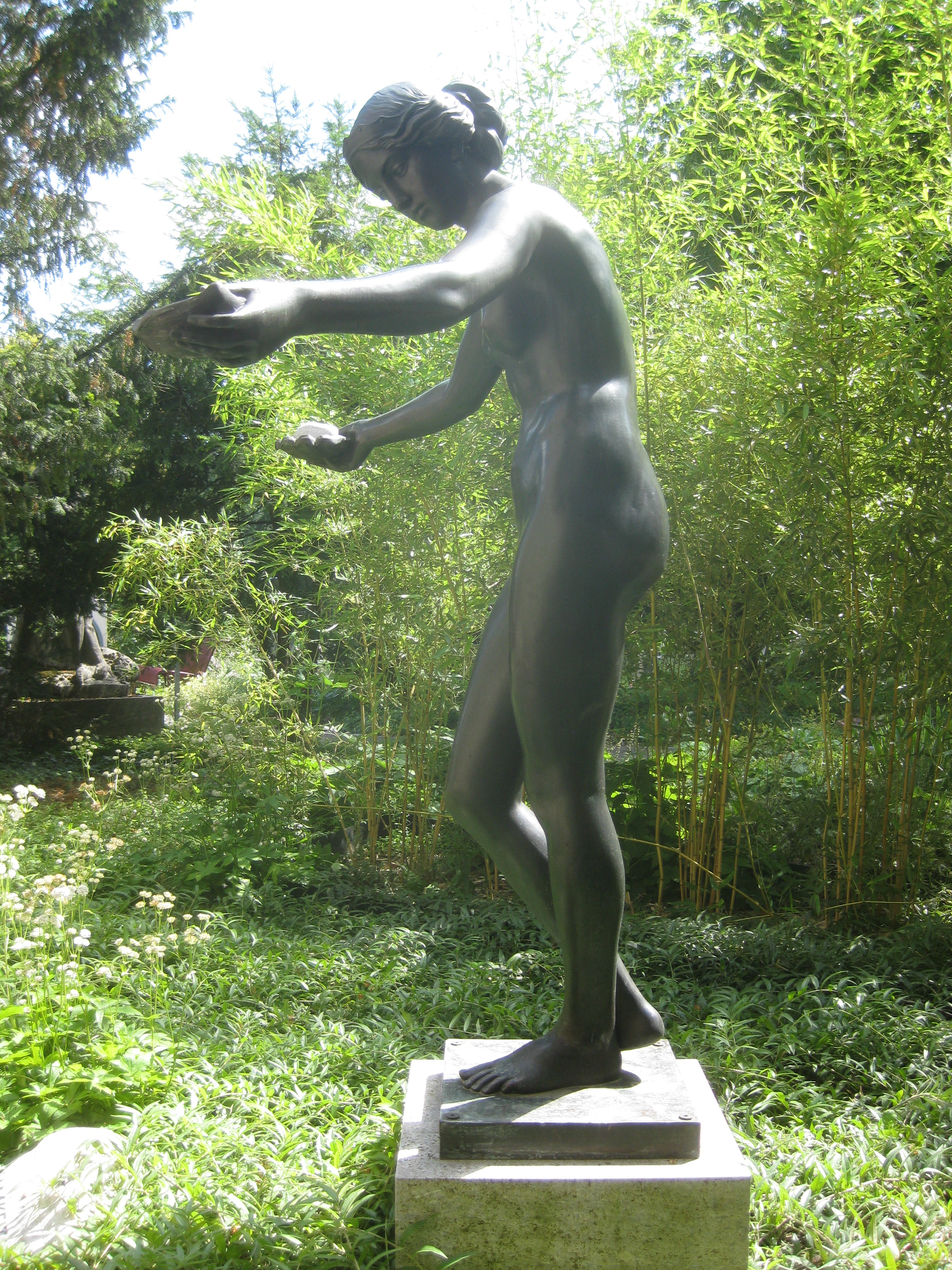 Nackte weibliche Nymphe auf quadratischer Plinthe von dem Düsseldorfer Bildhauer Franz Linden (1873-?), Bronze, niedriger quaderförmiger Steinsockel, Höhe ohne Sockel ca. 165 cm, Entstehungsjahr etwa ab 1910, bezeichnet an der Plinthe links: „FRANZ LINDEN / DUESSELDORF.“, ursprünglich: Stuttgart, Villa Berg, auf dem Brunnen im Rosengarten, etwa seit 1980: auf dem Brunnen im Südgarten der Villa Berg auf der Tiefgarage des Südwestrundfunks, heute: Stuttgart, Pragfriedhof, links neben dem Historischen Leichenhaus (2007 wurde die Skulptur wegen mehrfachem Vandalismus vom Gartenamt abgeräumt und eingelagert, später auf dem Pragfriedhof wieder aufgestellt. Das Historische Leichenhaus befindet sich links am Ende der Hauptallee, die beim Haupteingang in der Friedhofstraße beginnt.) Die nackte Nymphe stand ursprünglich als Brunnenfigur im Rosengarten vor der Kulisse des Gartenbelvedere, später ebenfalls als Brunnenfigur im Südgarten auf einem niedrigen Steinsockel. Sie breitet die Arme aus und läßt aus den beiden Muscheln, die sie in Händen hält, das Wasser in feinen Strahlen in den Brunnen hinabrieseln. An ihrem jetzigen Standort auf dem Pragfriedhof hat sie ihre Funktion als Brunnenfigur verloren. Die Nymphe wurde früher fälschlich Albert Güldenstein zugeschrieben, wohl auf Grund einer Verwechslung des Brunnens mit dem Nymphenbrunnen an der Ostfassade der Villa Berg, dessen figurale Ausstattung von Güldenstein stammt.